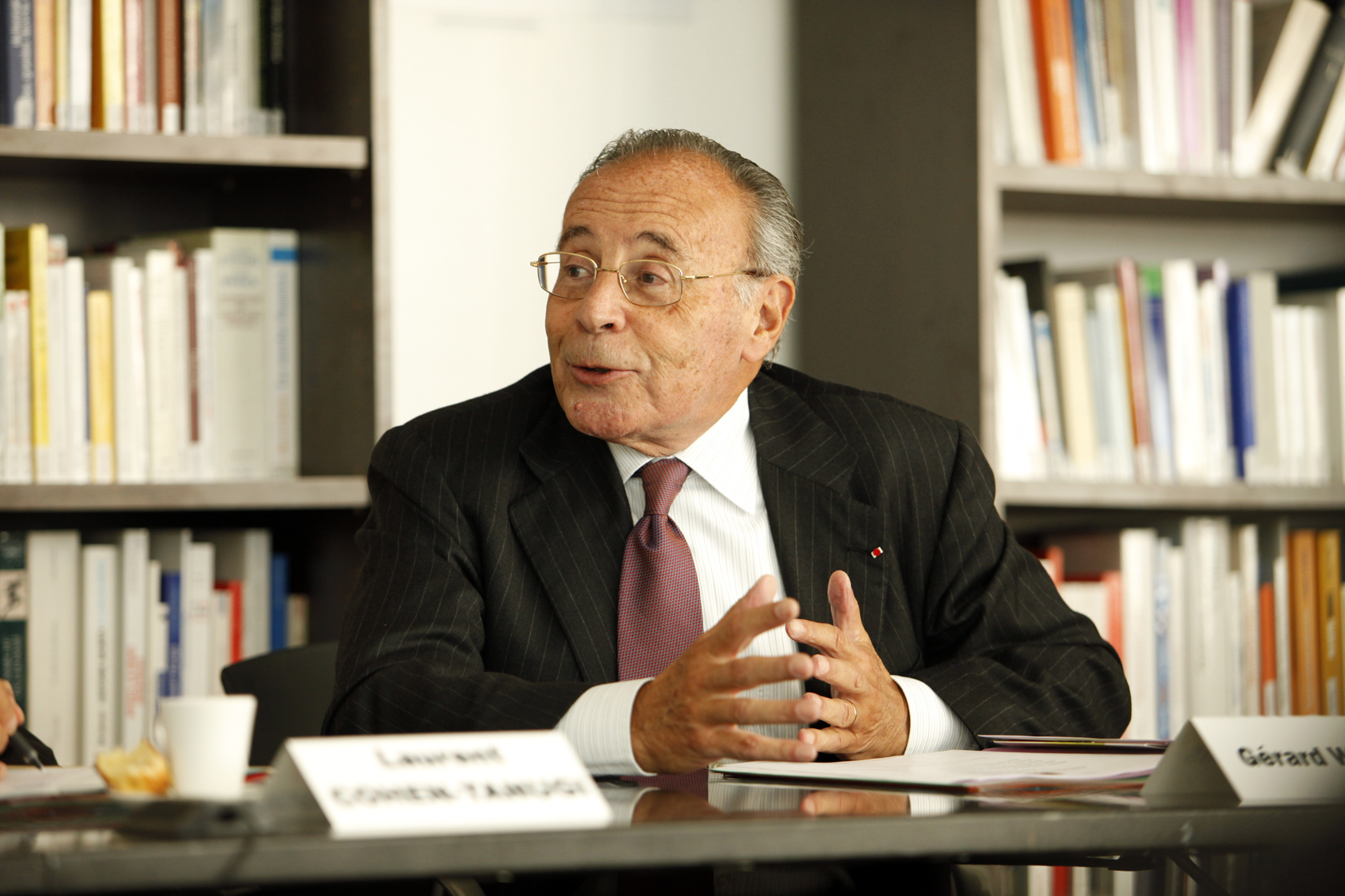 Conseil de surveillance (octobre 2009)